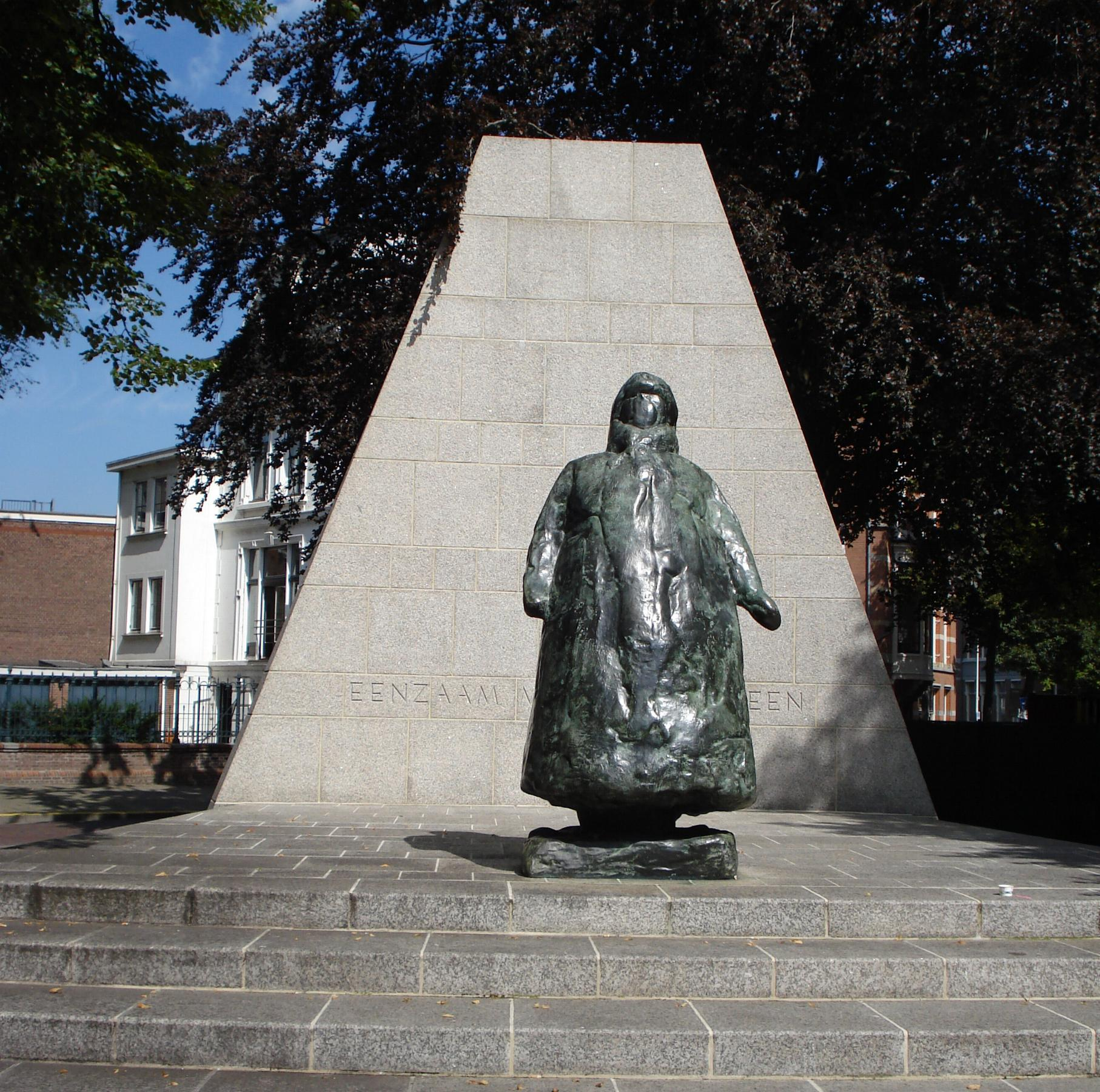 Den Haag, Noordeinde. Kunstwerk "Wilhelmina" van Charlotte van Pallandt. The Hague/The Netherlands.